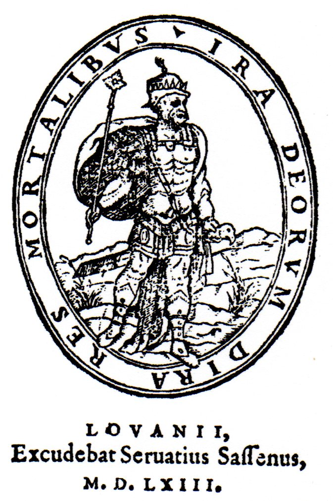 Marque typographique de l'imprimeur de Louvain Servatius Sassenus, sur la page de titre de Hodoeporici Byzantini libri III, autore Hugone Fauolio, Lovaniii, Excudebat Servatius Sassenus M D LXIII. DEVISE: IRA DEORUM DIRA RES MORTALIBUS. (reproduit dans: Bibliotheca Belgica, 226ème livraison, Bibliothèque Royale, année 1962 (short citation of a public domain document)